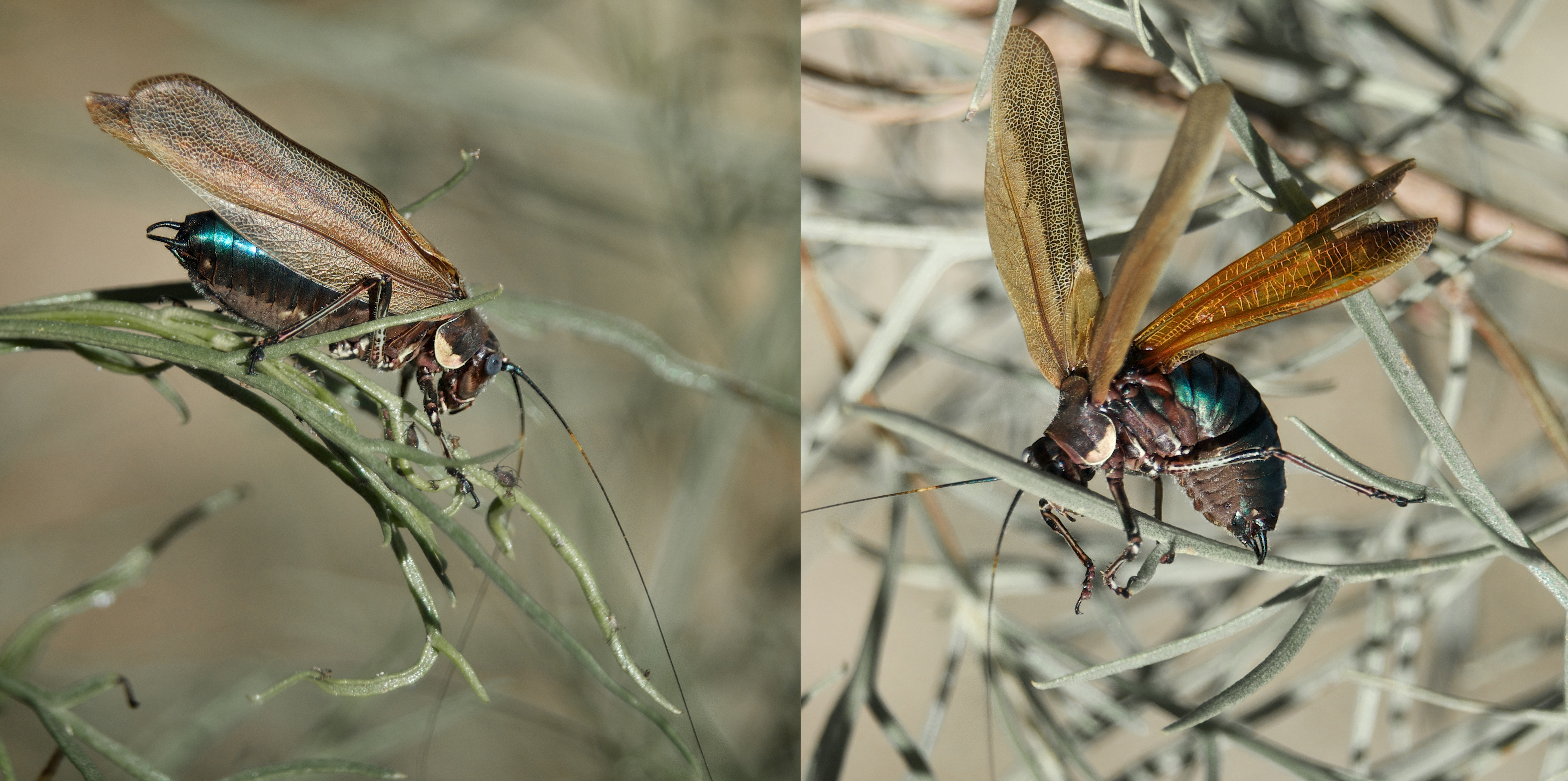 Heuschrecke imitiert Wespe